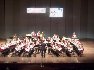 Het Fanfare-A orkest (Koninklijke Fanfare U.L.T.O. Winssen-Ewijk) tijdens het concours te venlo in november 2005.